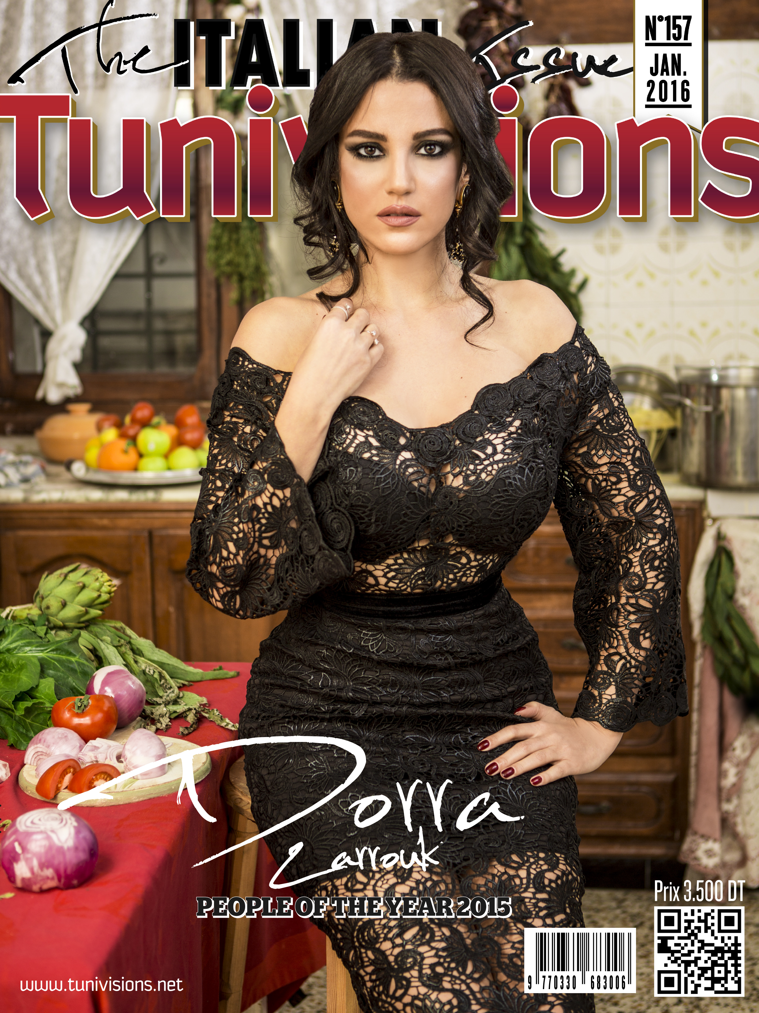 Couverture du numéro 157 du magazine tunisien Tunivisions.